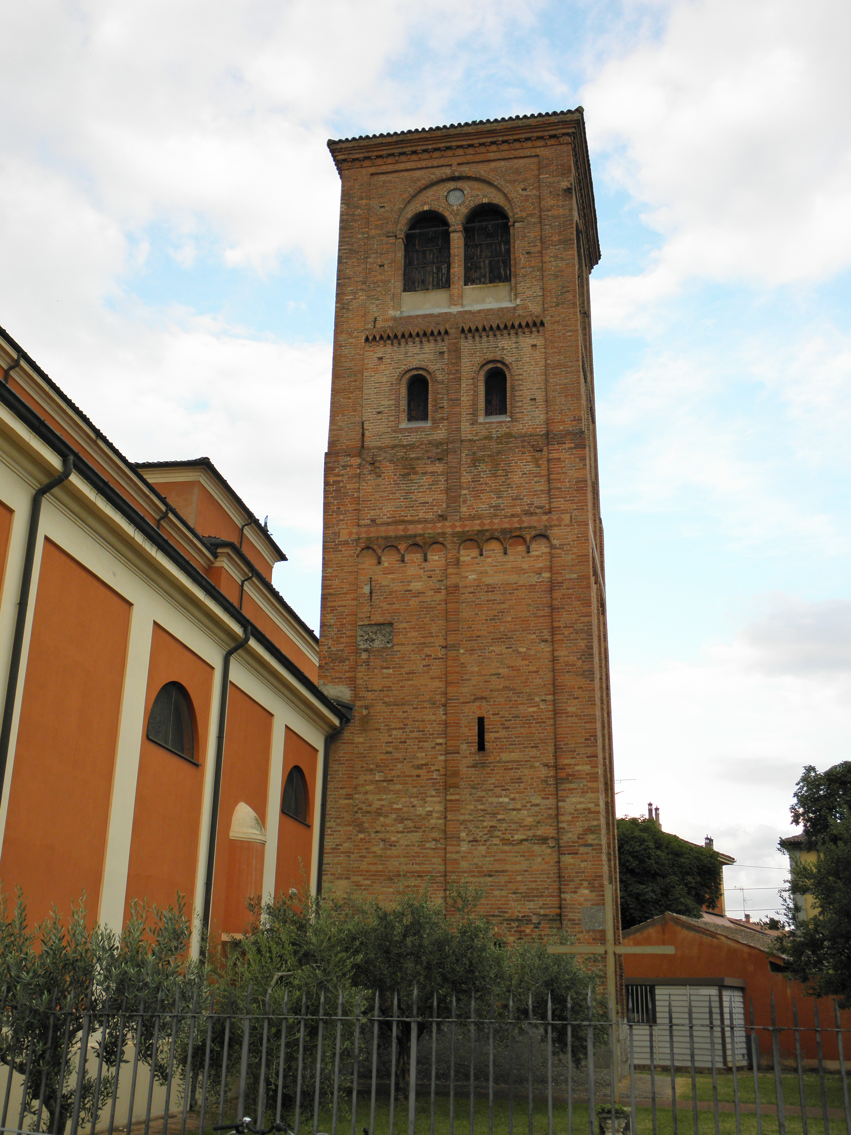 San Pietro in Casale: Piazza Giovanni XXIII, il campanile romanico della Chiesa dei Santi Pietro e Paolo.